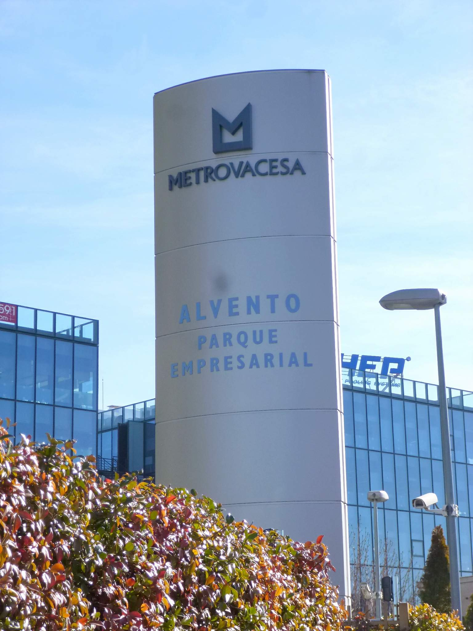 Madrid - Parque Empresarial Alvento